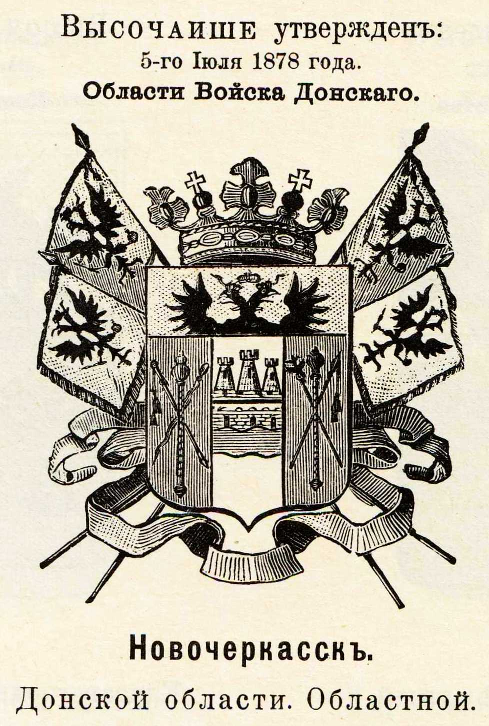 Official Russian Empire coat of arm Novocherkassk. Герб Российской Империи областного города Новочеркасск Донской области с официальным описанием в Гербовнике Винклера.